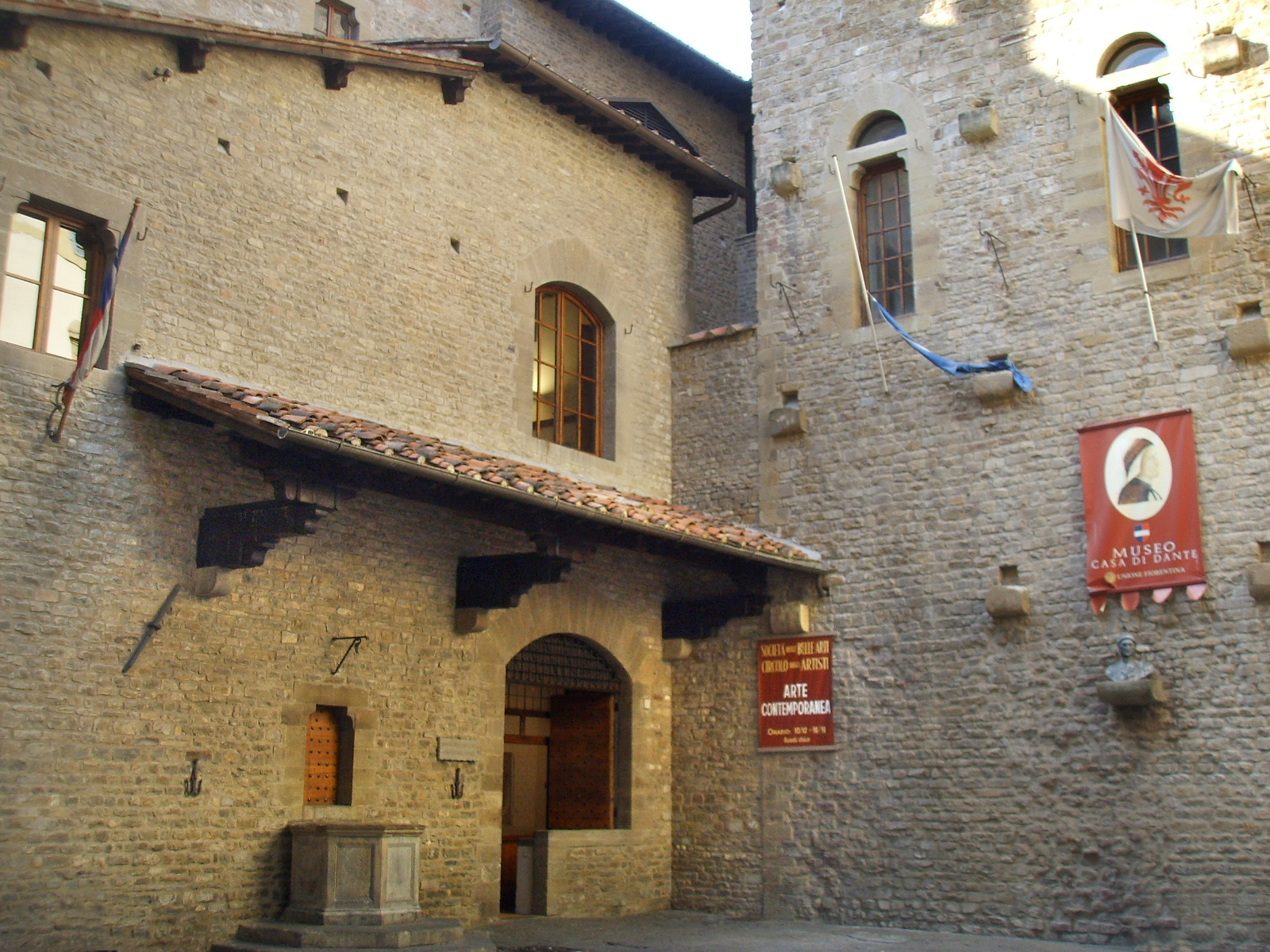 Casa di dante 01